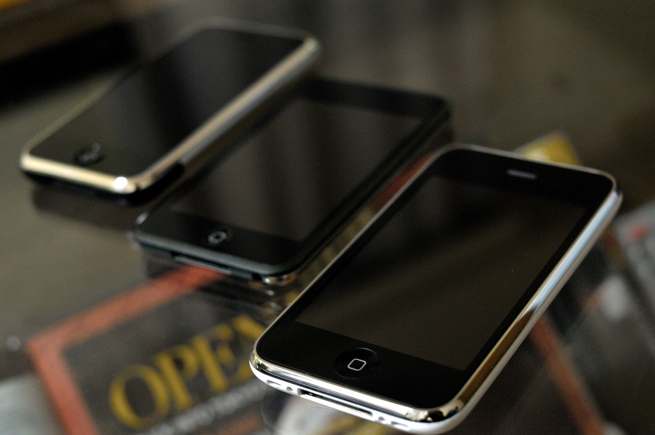 %u4ECA%u3001%u5B9F%u306F%u6211%u304C%u5BB6%u306B%u306F3%u3064%u63C3%u3063%u3066%u307E%u3059%u3002%u521D%u4EE3iPhone%u3060%u3051%u501F%u308A%u7269 Original iPhone, iPod touch 1G, iPhone 3G